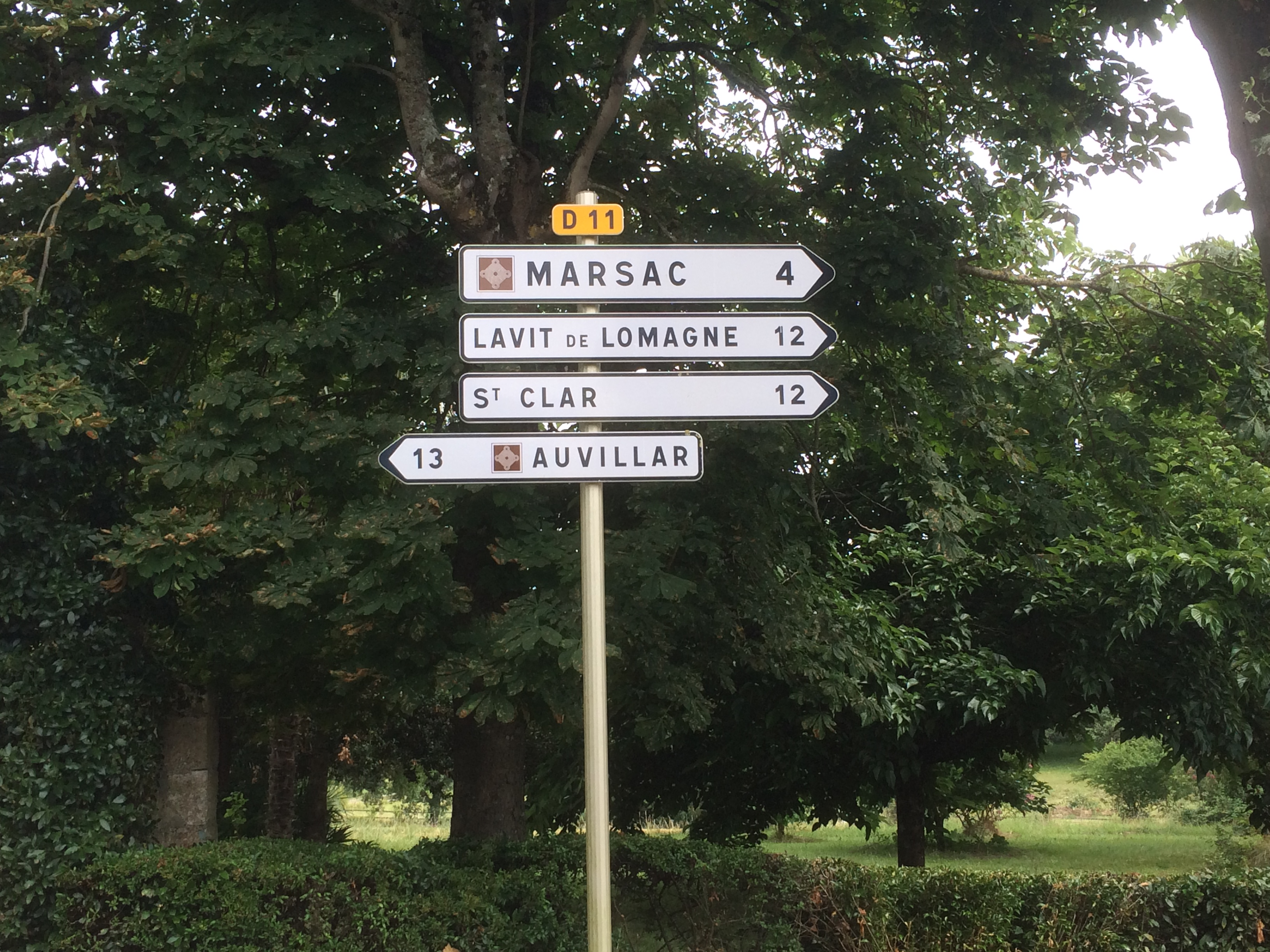 Panneau de signalisation à Poupas